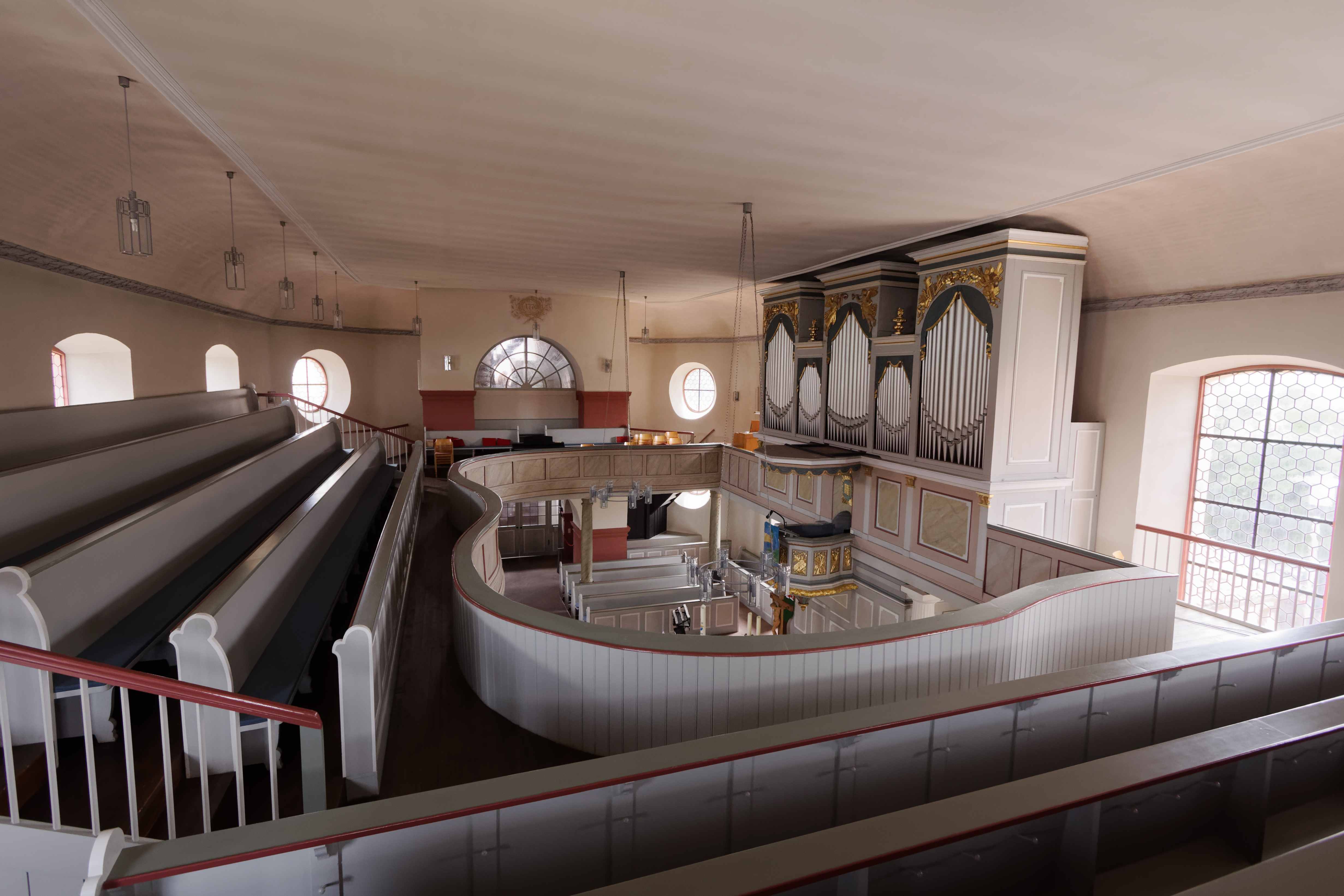 Empore der evangelischen Kirche in Dudenhofen, einem Stadtteil von Rodgau (Hessen) mit Blick zur Orgel-Kanzel-Wand.